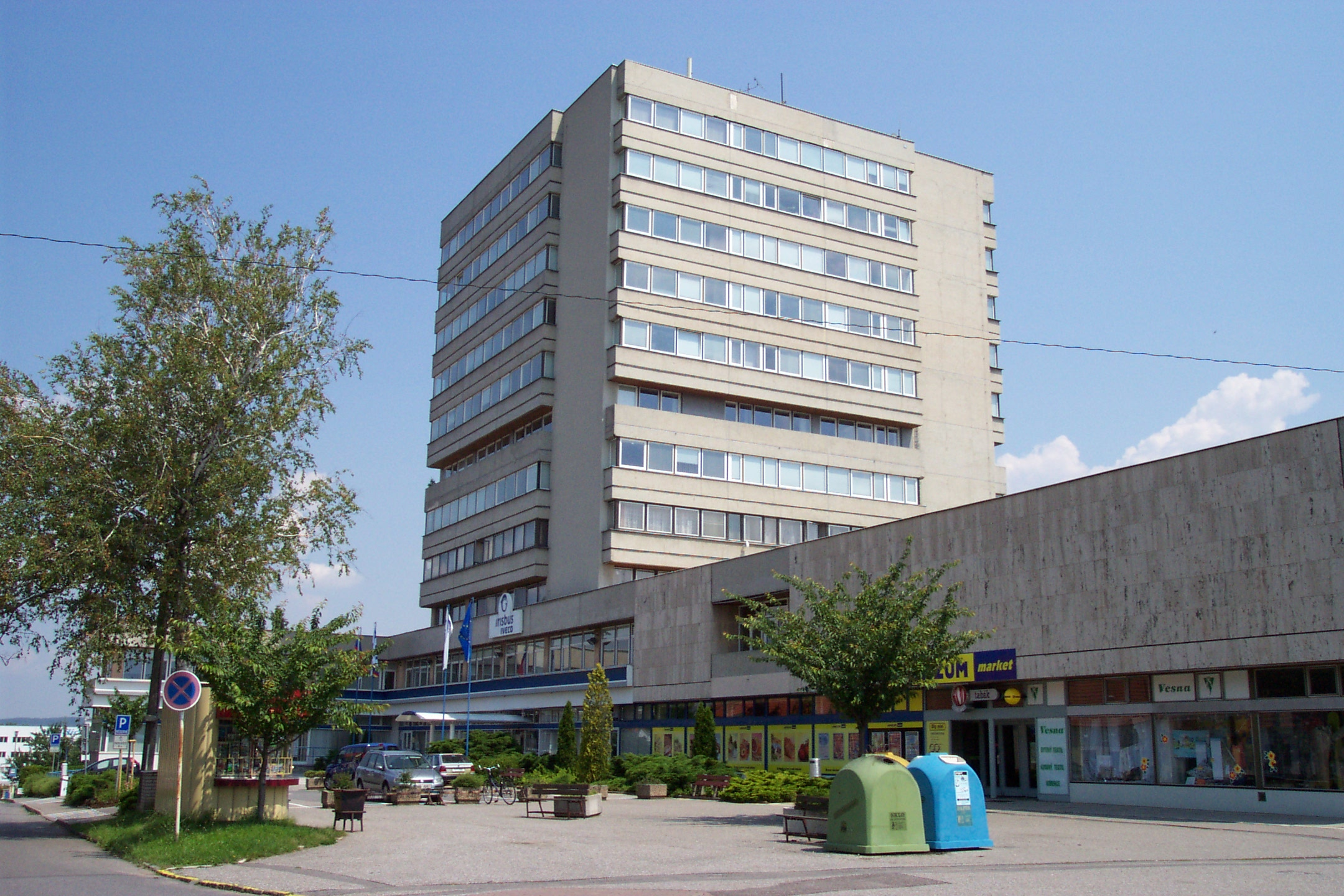 Vysoké Mýto - Budova společnosti Irisbus (dříve Karosa ) - Vysoké Mýto - The building of Irisbus/Karosa Company